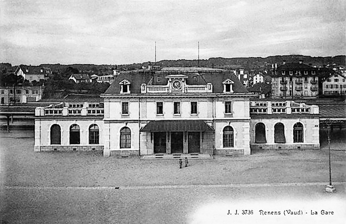 Gare de Renens, le bâtiment voyageurs ouvert en 1908, du aux architectes Jean Taillens et Charles Dubois (